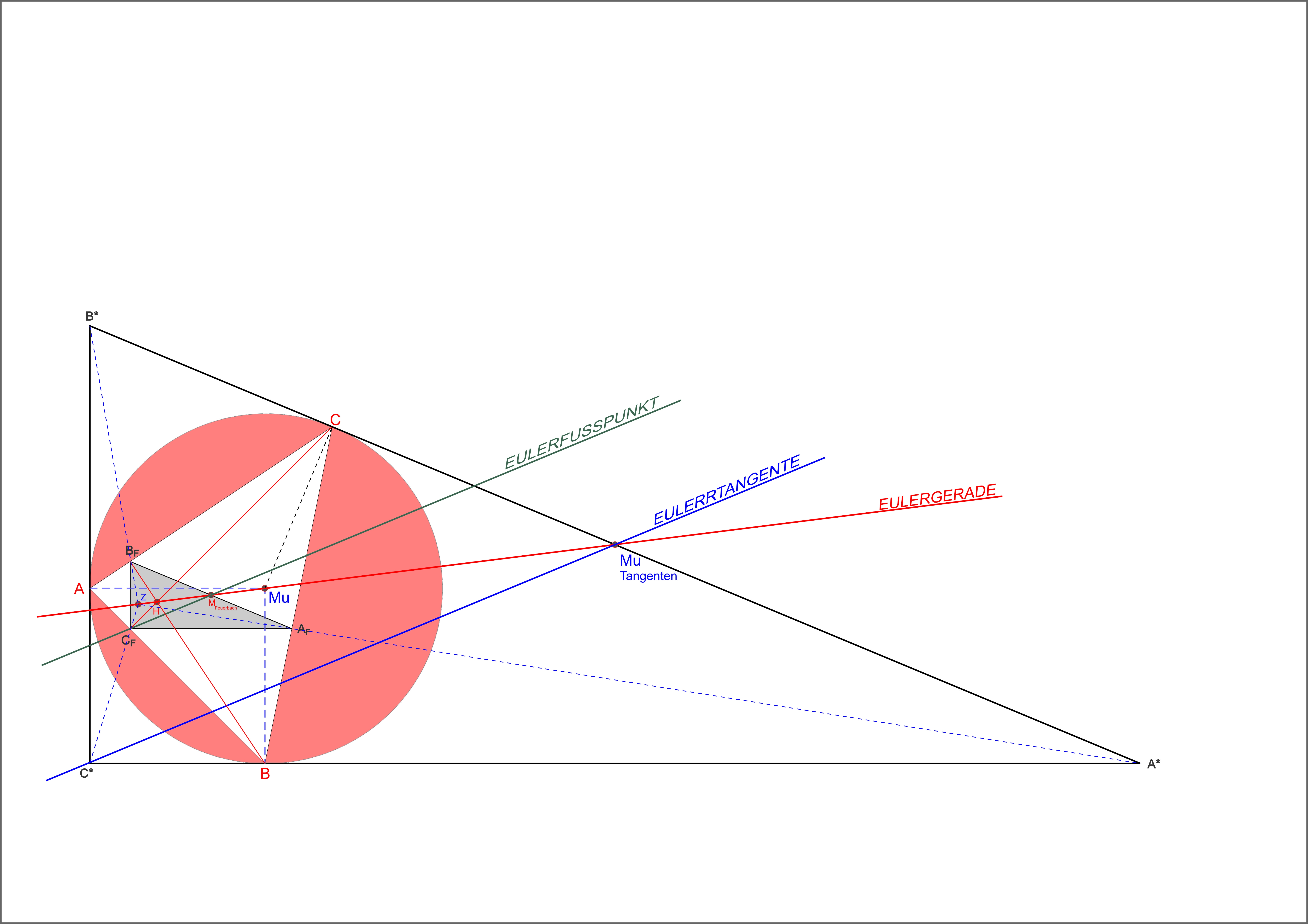 Ähnliches Höhenfußpunktdreieck zum Tangentendreieck